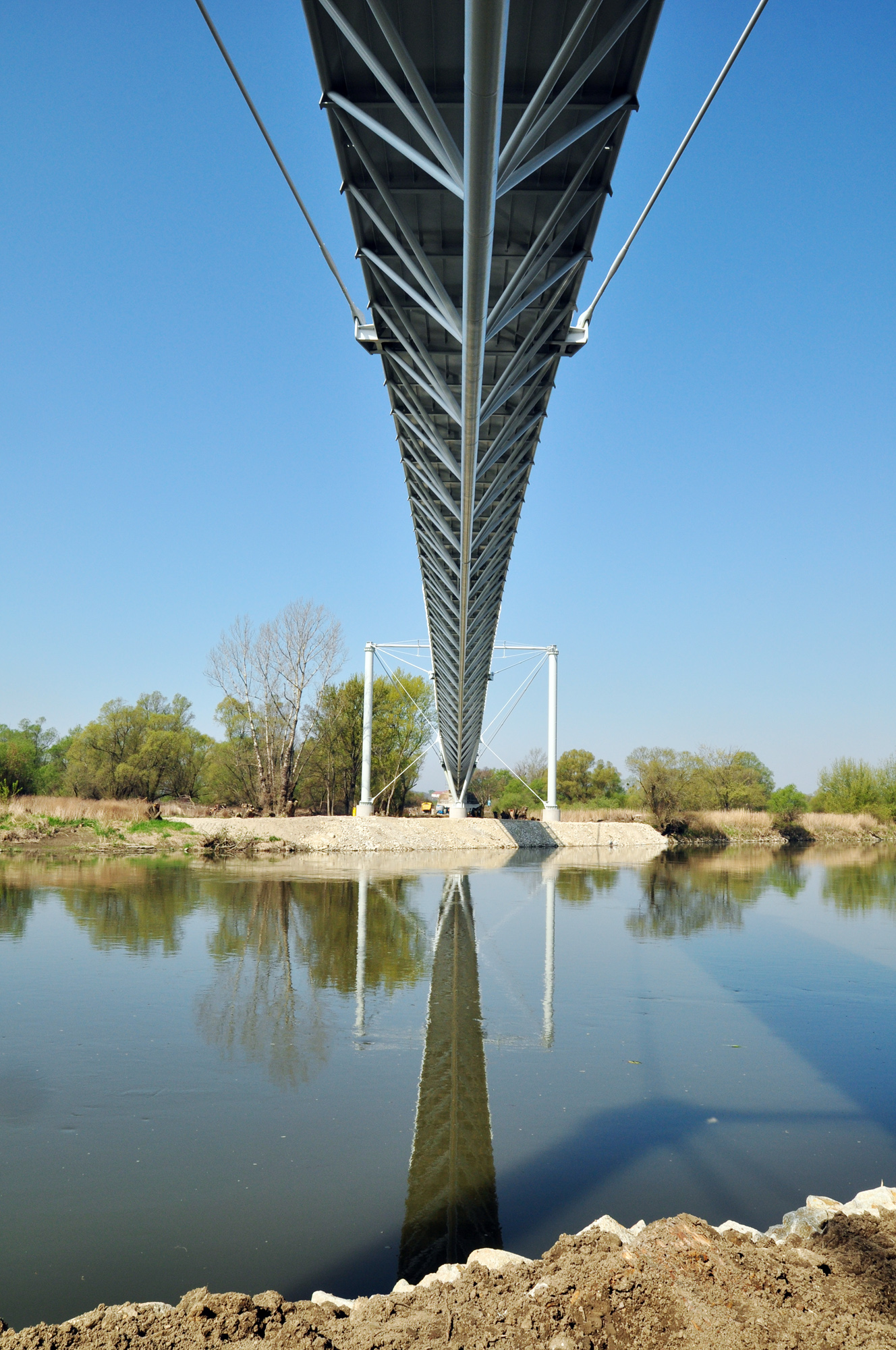 Výstavba cyklomostu Devínska Nová Ves – Schlosshof